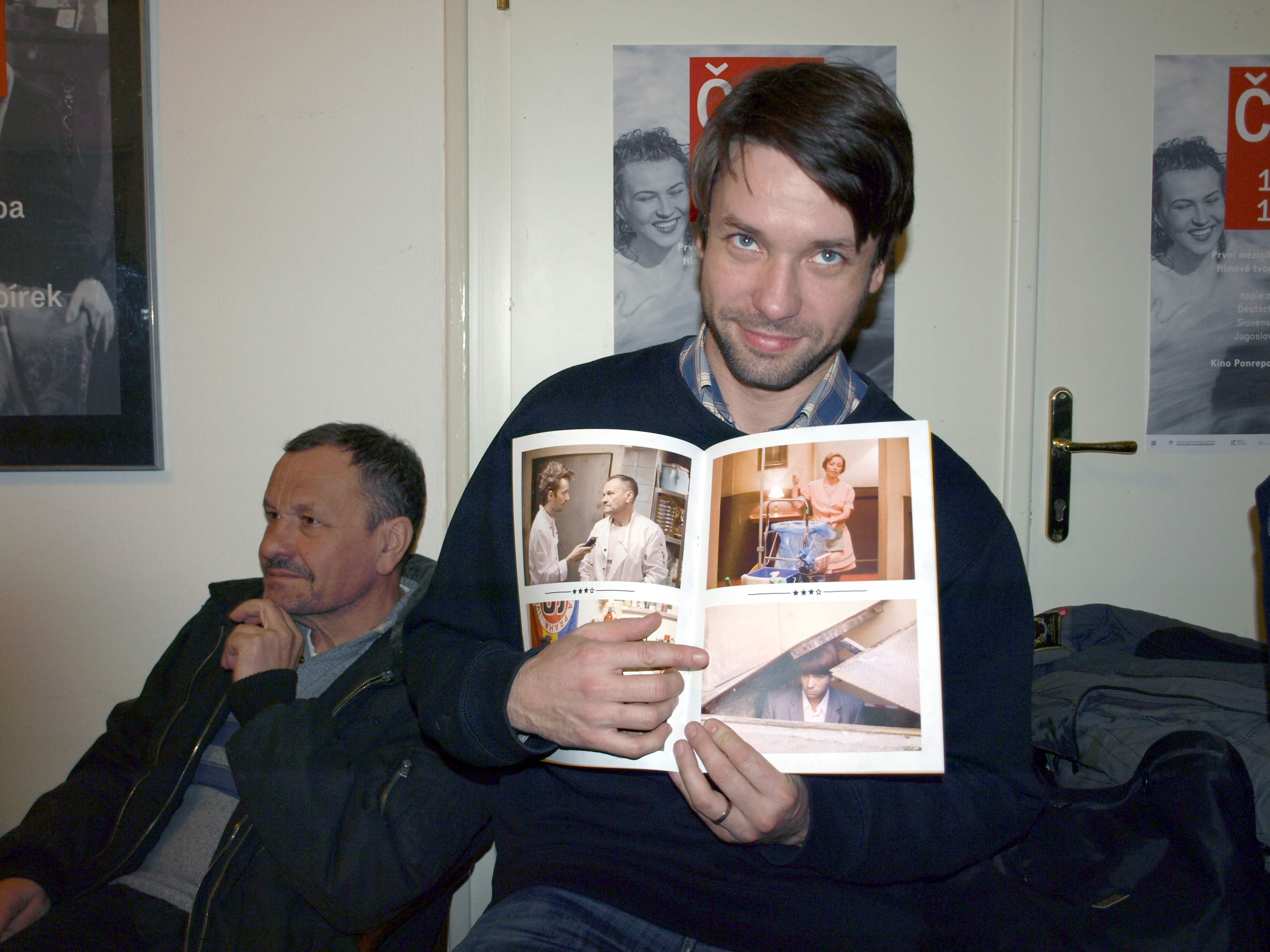 Fotky z novinářské konference.Blanka Borová - & 10Mpix.cz